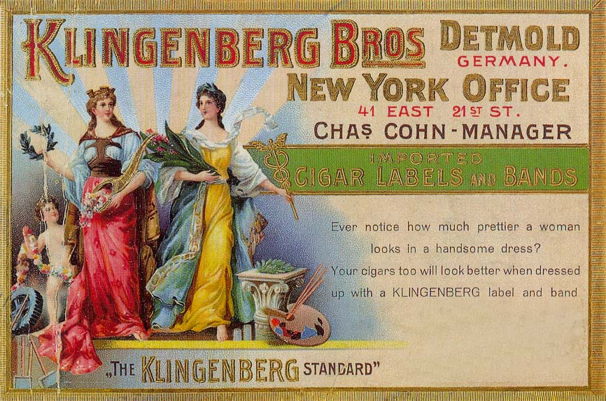 USA-Werbung der Fa. Klingenberg GmbH, Detmold